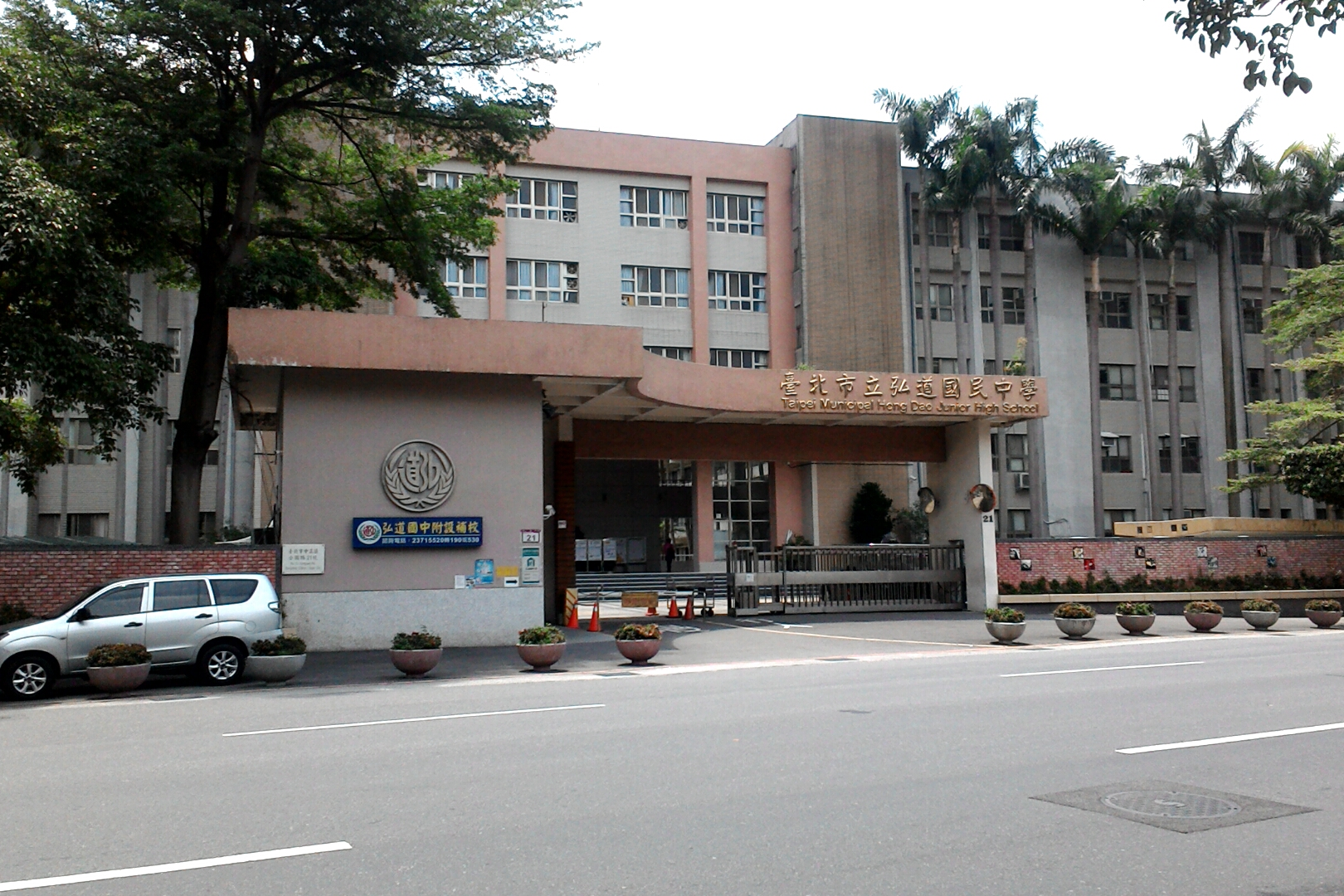 臺北市立弘道國民中學正門。